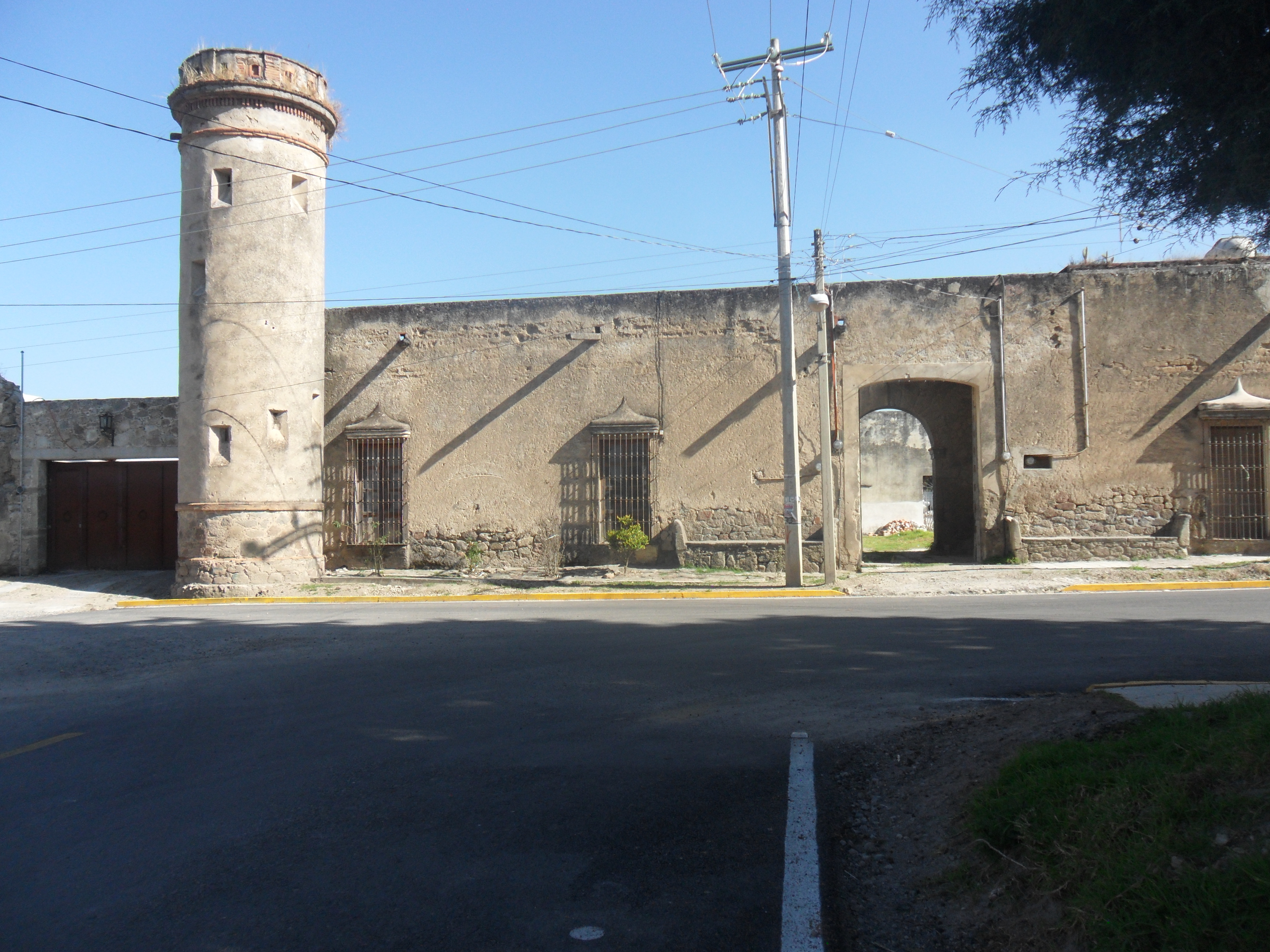 Exrancho San Juan ubicado en la población de San Pedro Tlalcuapan.